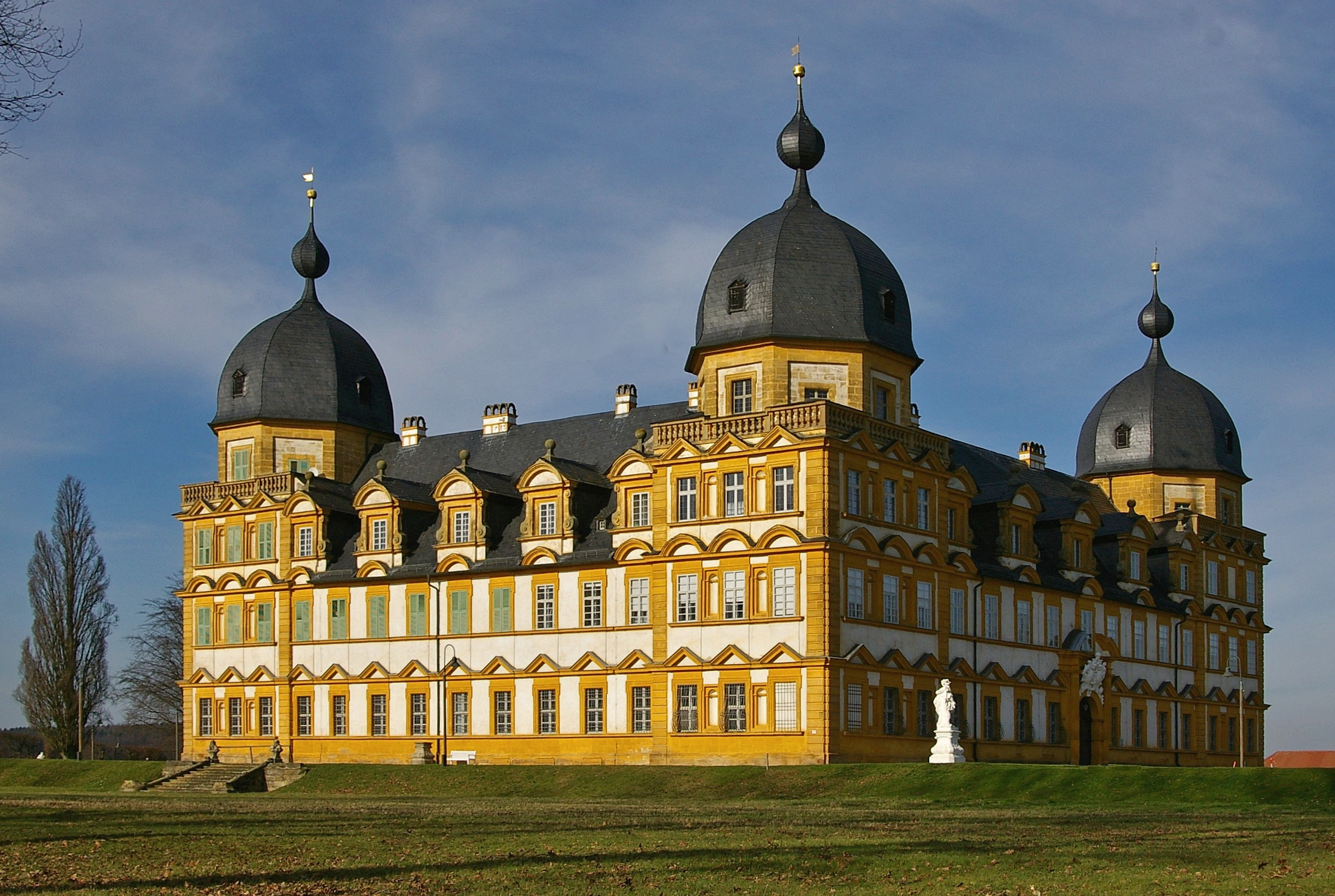 Schloss Seehof - Blick vom Park